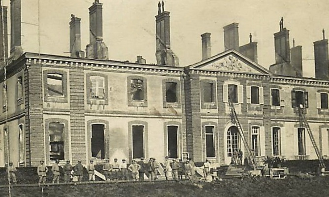 Le château de Chèreperrine (Orne) appartenant à M. de Lévis-Mirepoix après l'incendie qui l'a ravagé en 1924